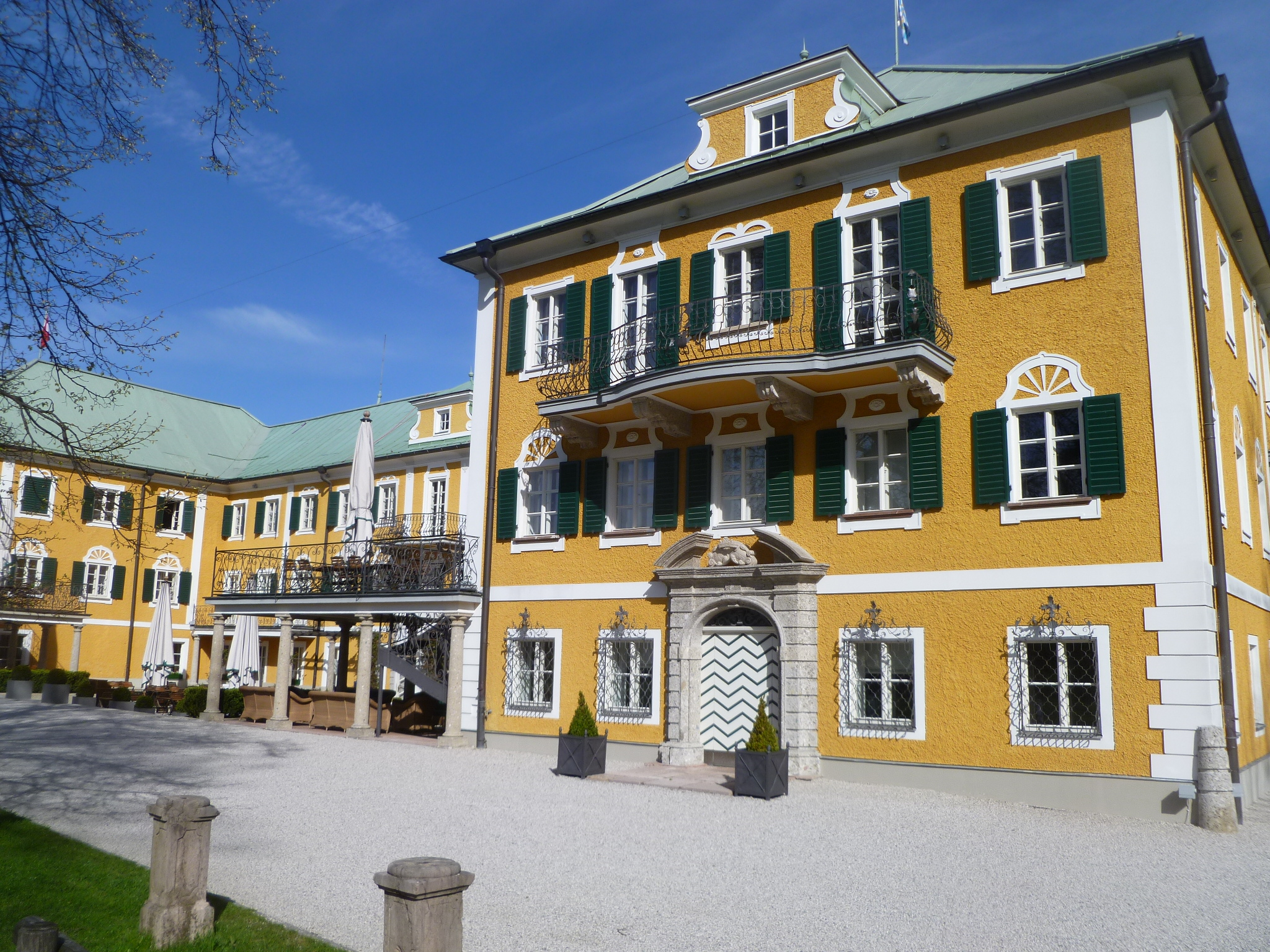 Rupertihof/Schlosshotel St. Rupert